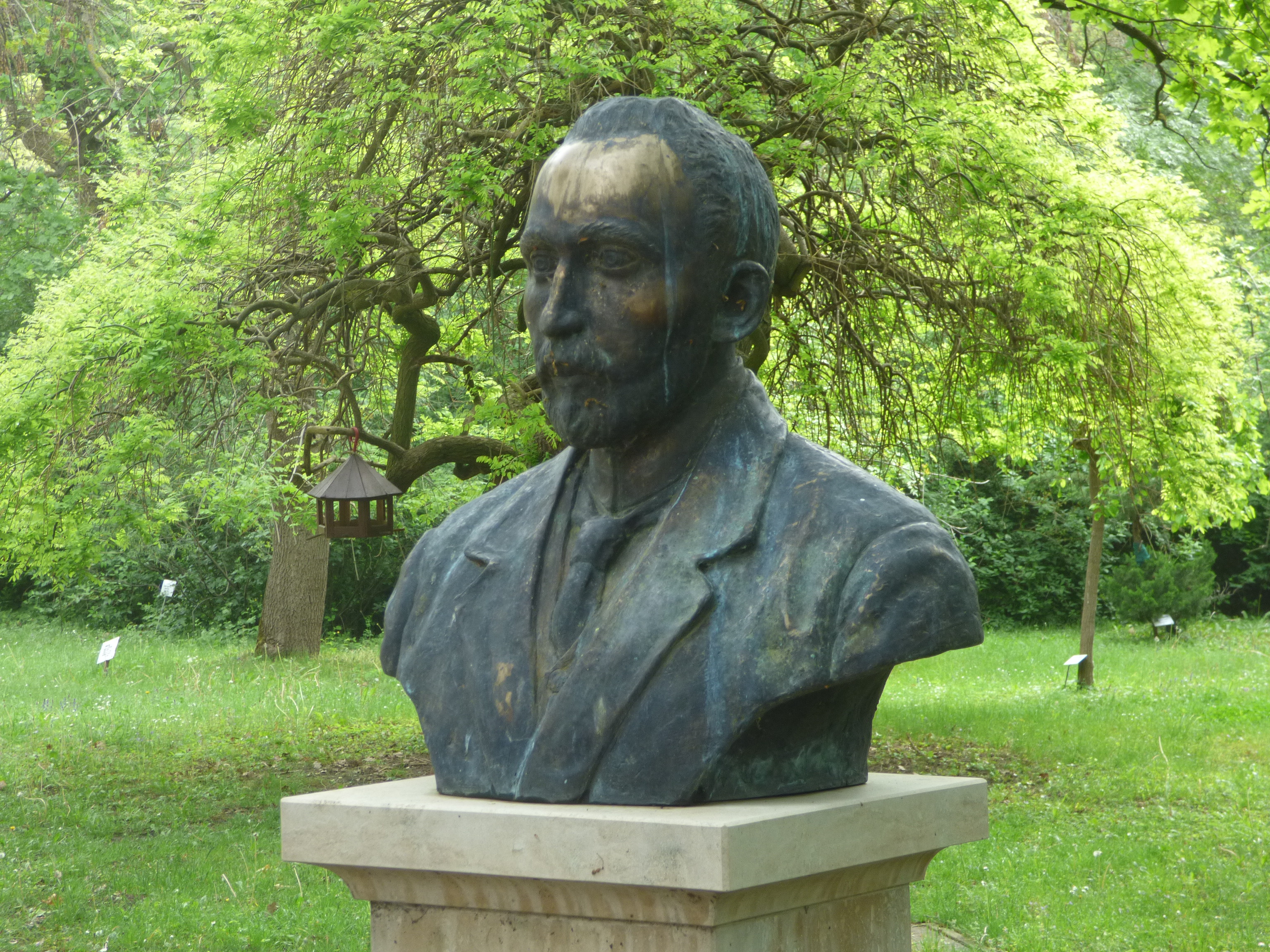 Bolza Pál szobra a szarvasi arborétumban